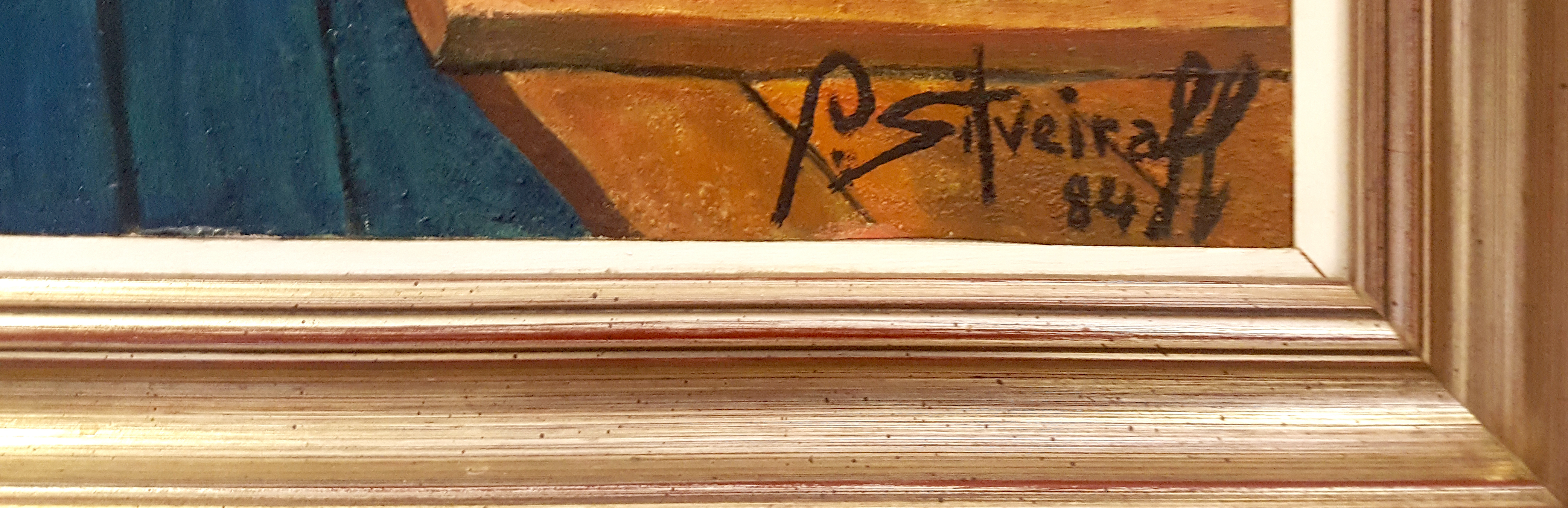 Hombres y máquinas, otoño de 1984. Óleo sobre tela, 160 x 89 cm. Detalle de la firma. Guillermo Silveira García (1922–1987) Description painter, sculptor, military personnel and art educatorDate of birth/death 11 January 1922 11 May 1987Location of birth/death Segura de León BadajozWork periodcirca 1945-1987Work location BadajozAuthority control : Q5888937 VIAF: 100940319 ISNI: 0000 0000 7827 0108 GND: 139488154 BNE: XX4841676 creator QS:P170,Q5888937